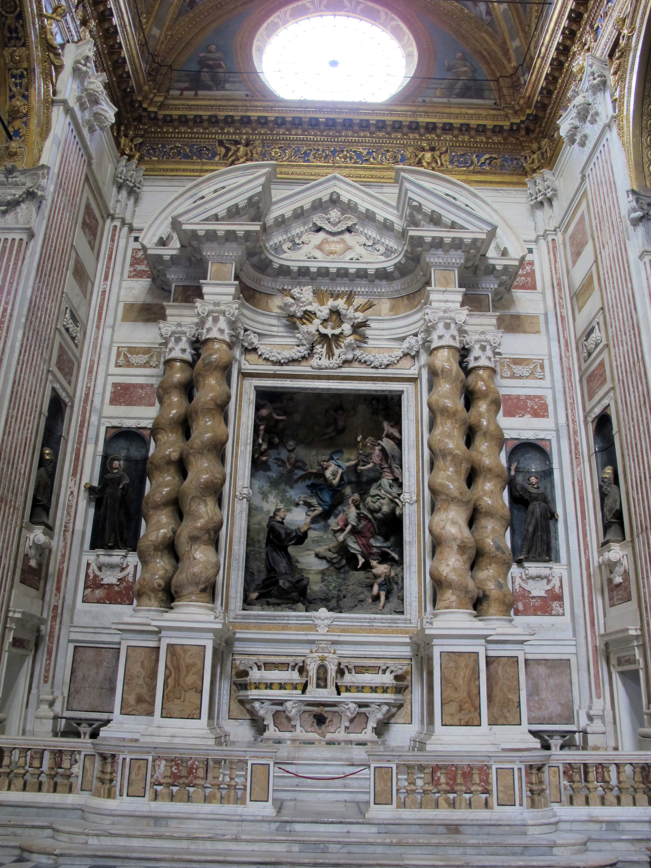 Genova, Liguria